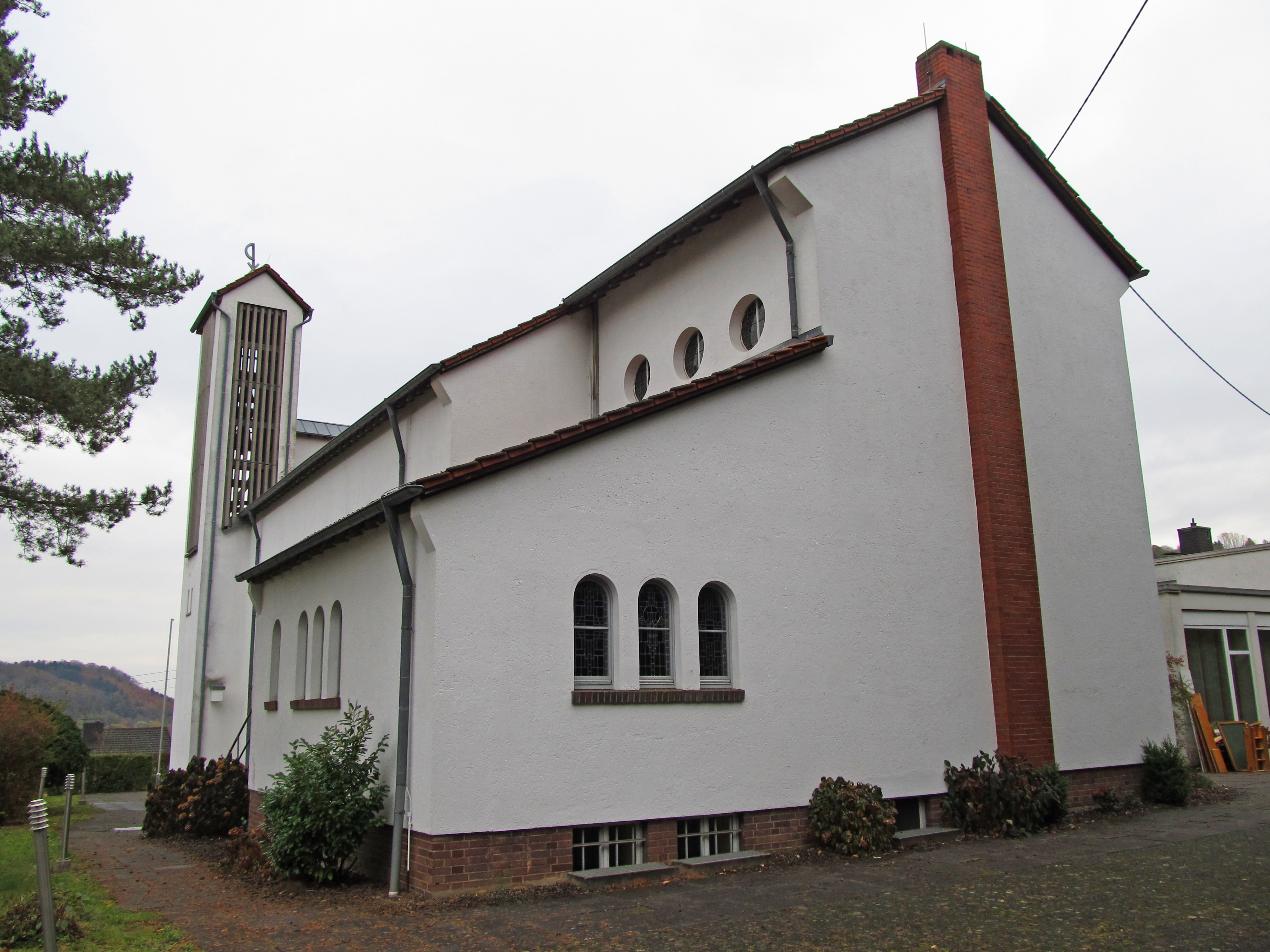 Die katholische Kirche St. Ursula in Scheidt, einem Stadtteil der saarländischen Landeshauptstadt Saarbrücken